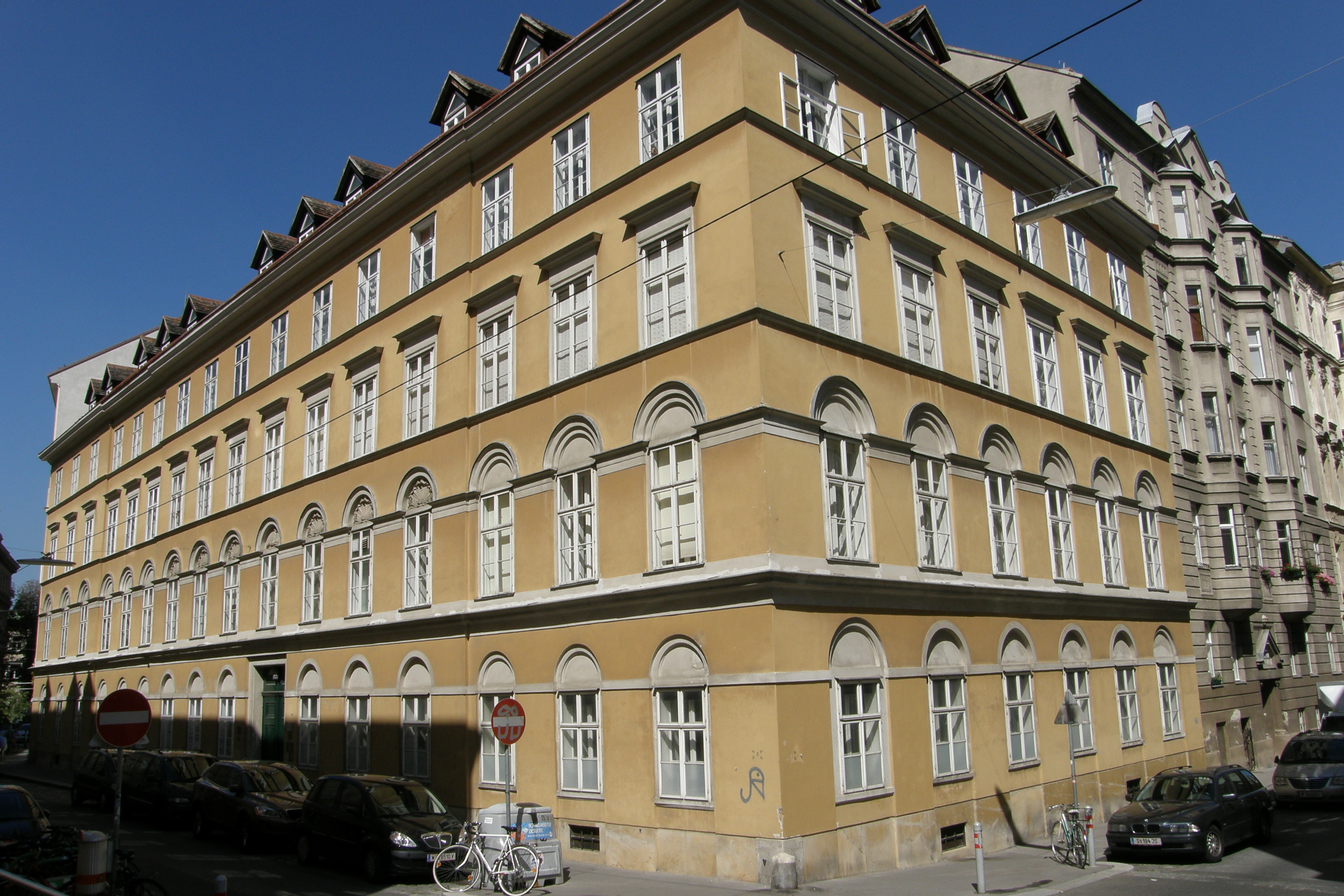 Mitshaus, erbaut 1829